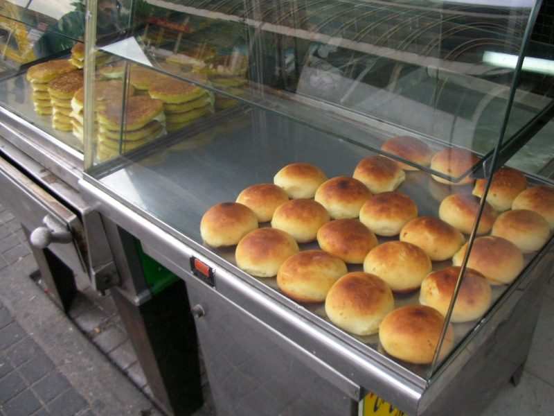 Almojabana, Almojabanita, Arepa de Choclo